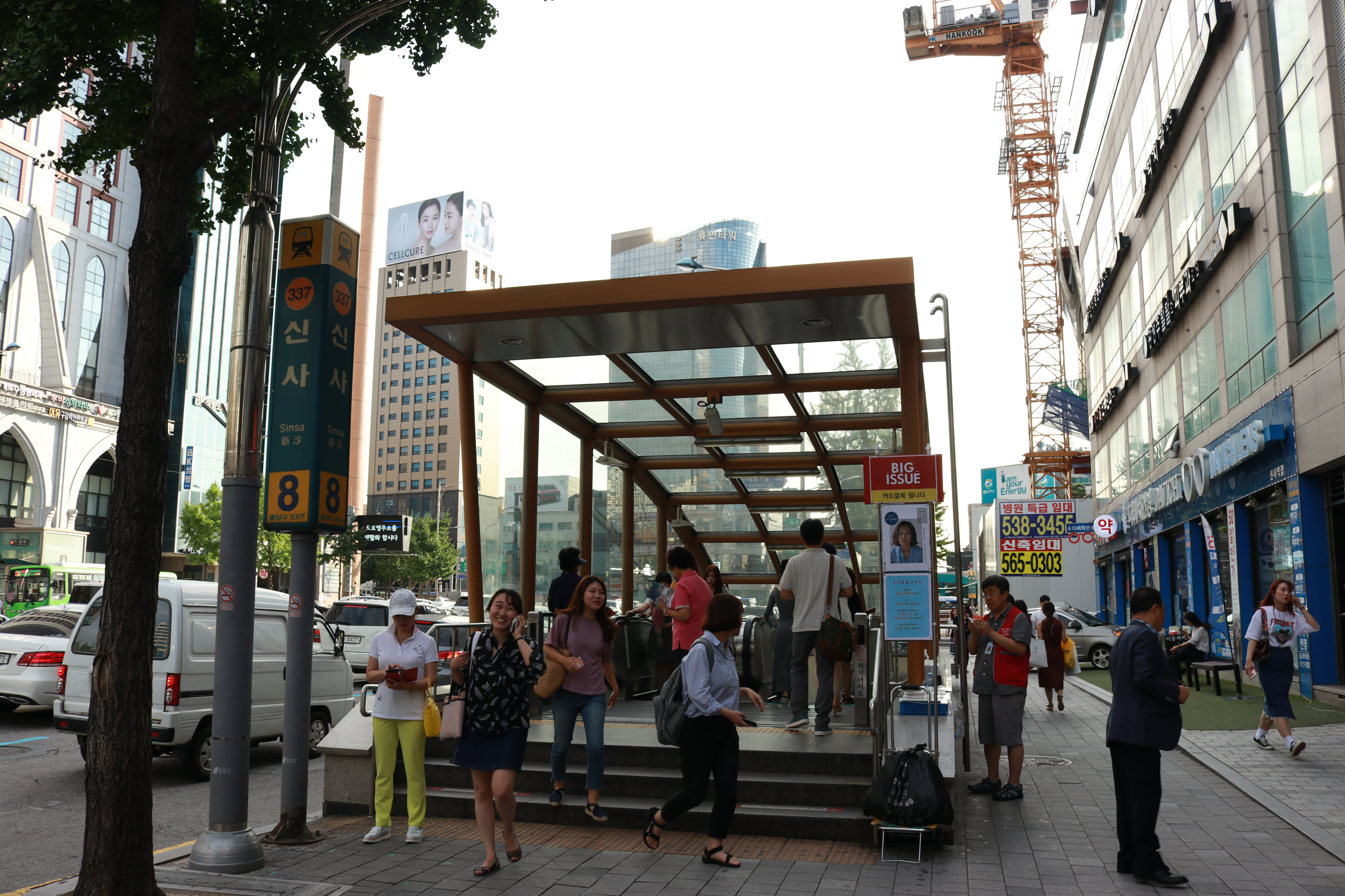 신사역 8번출구